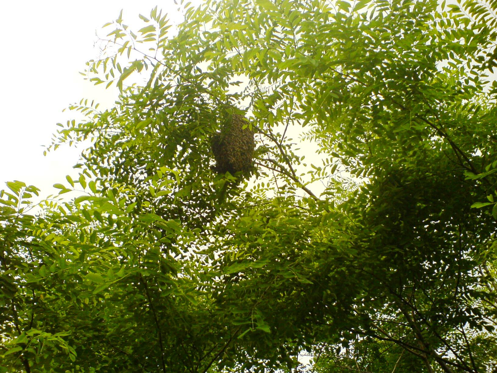 A bee swarm